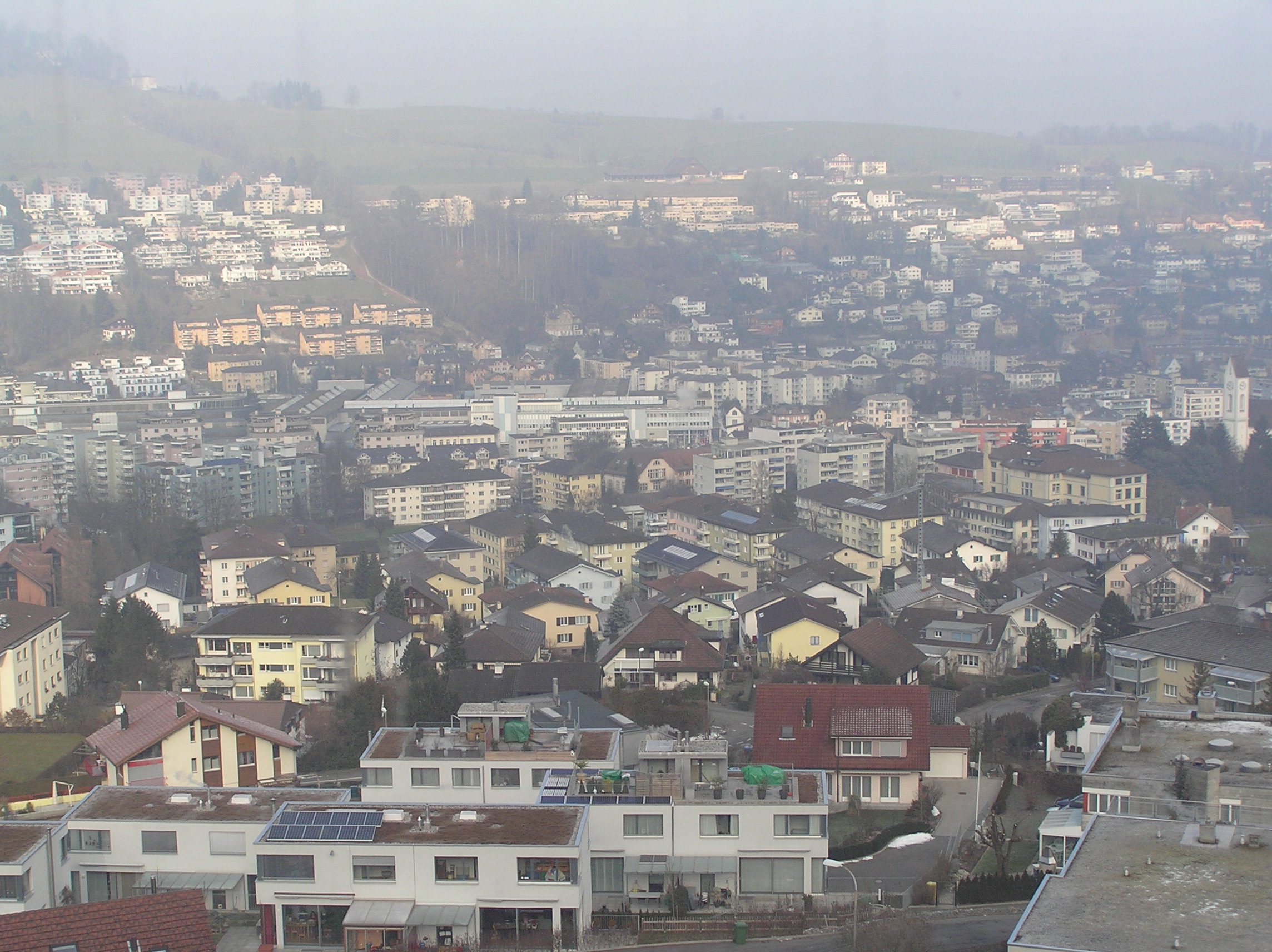 Kriens von der Pilatus-Seilbahn aus geseheen